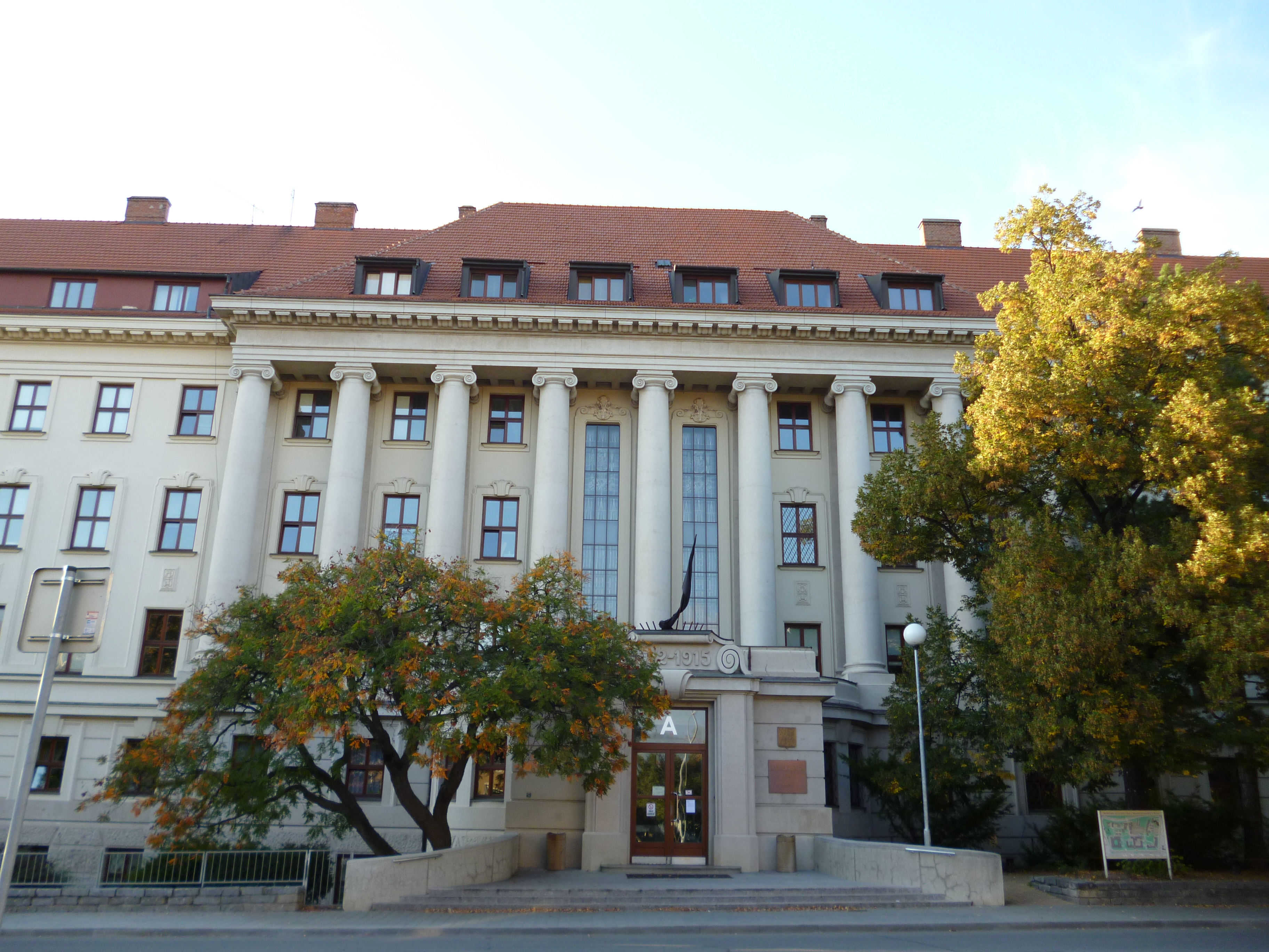 Universita, z toho jen: průčelí (Brno), Černá Pole, Zemědělská 1665/1, Brno